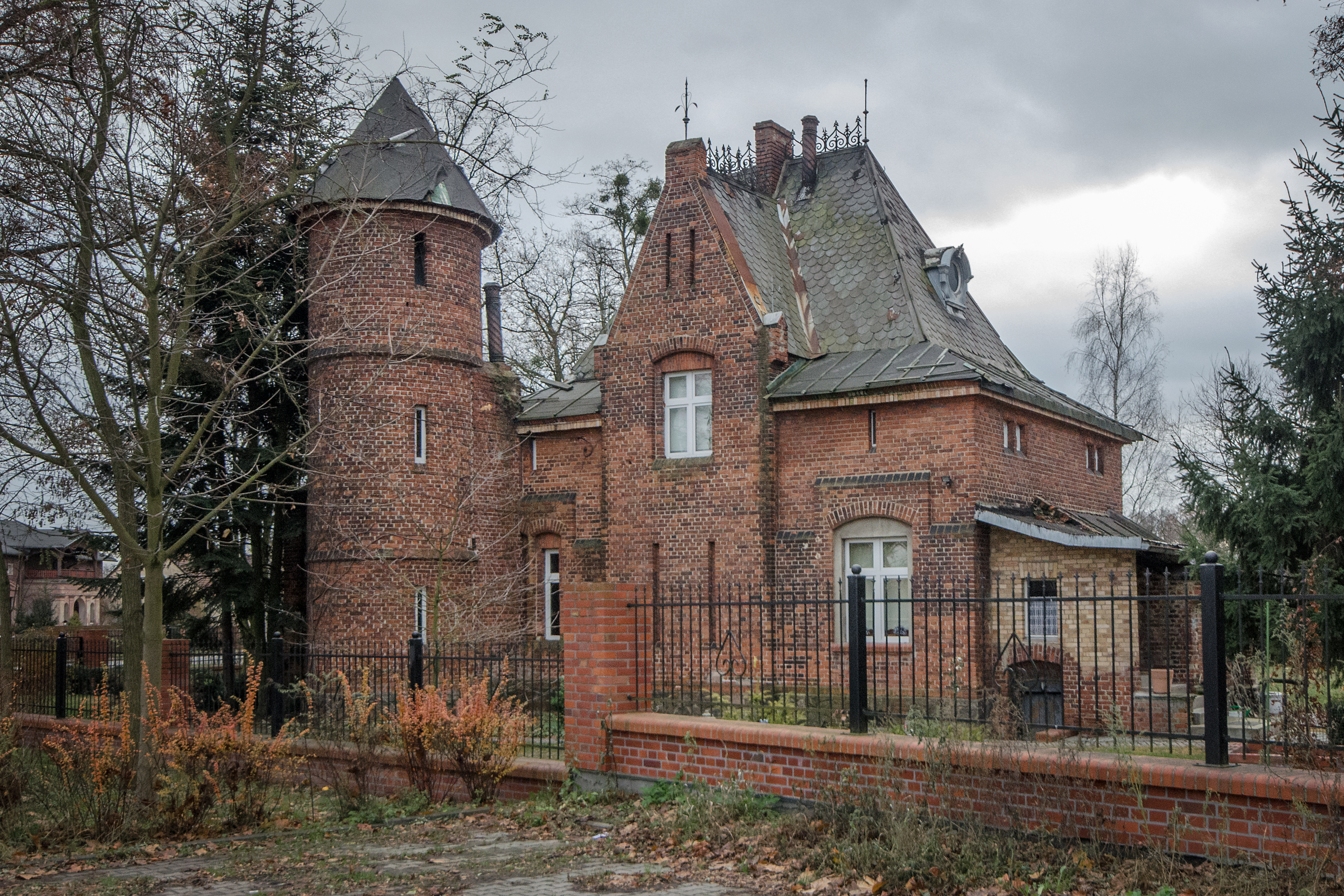 Brzeg Dolny, willa, 1910